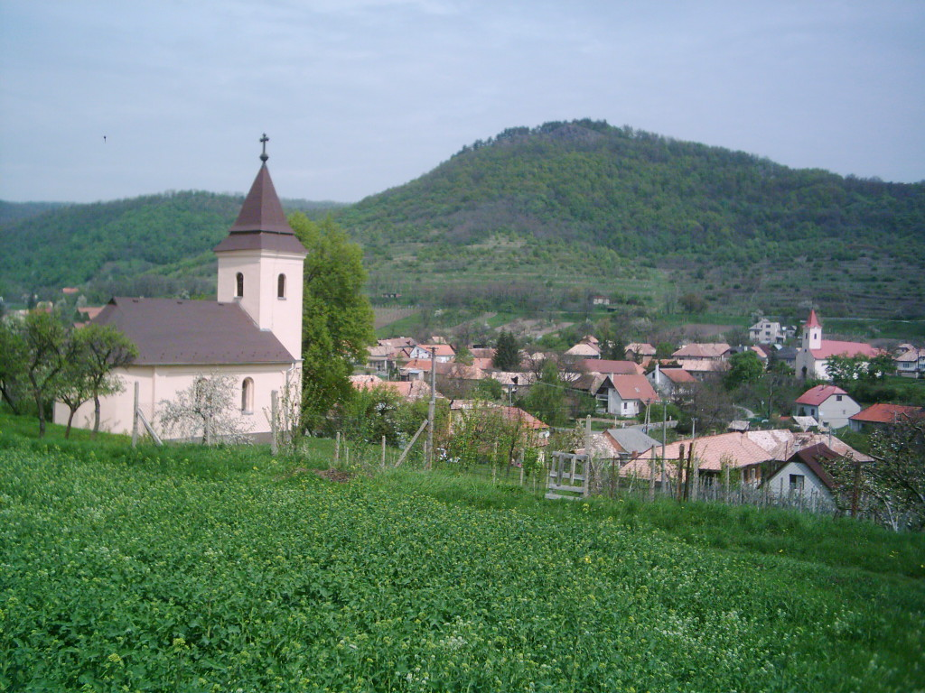 Dacsókszi - Kosihovce, Szlovákiai falu az evang. templomtól